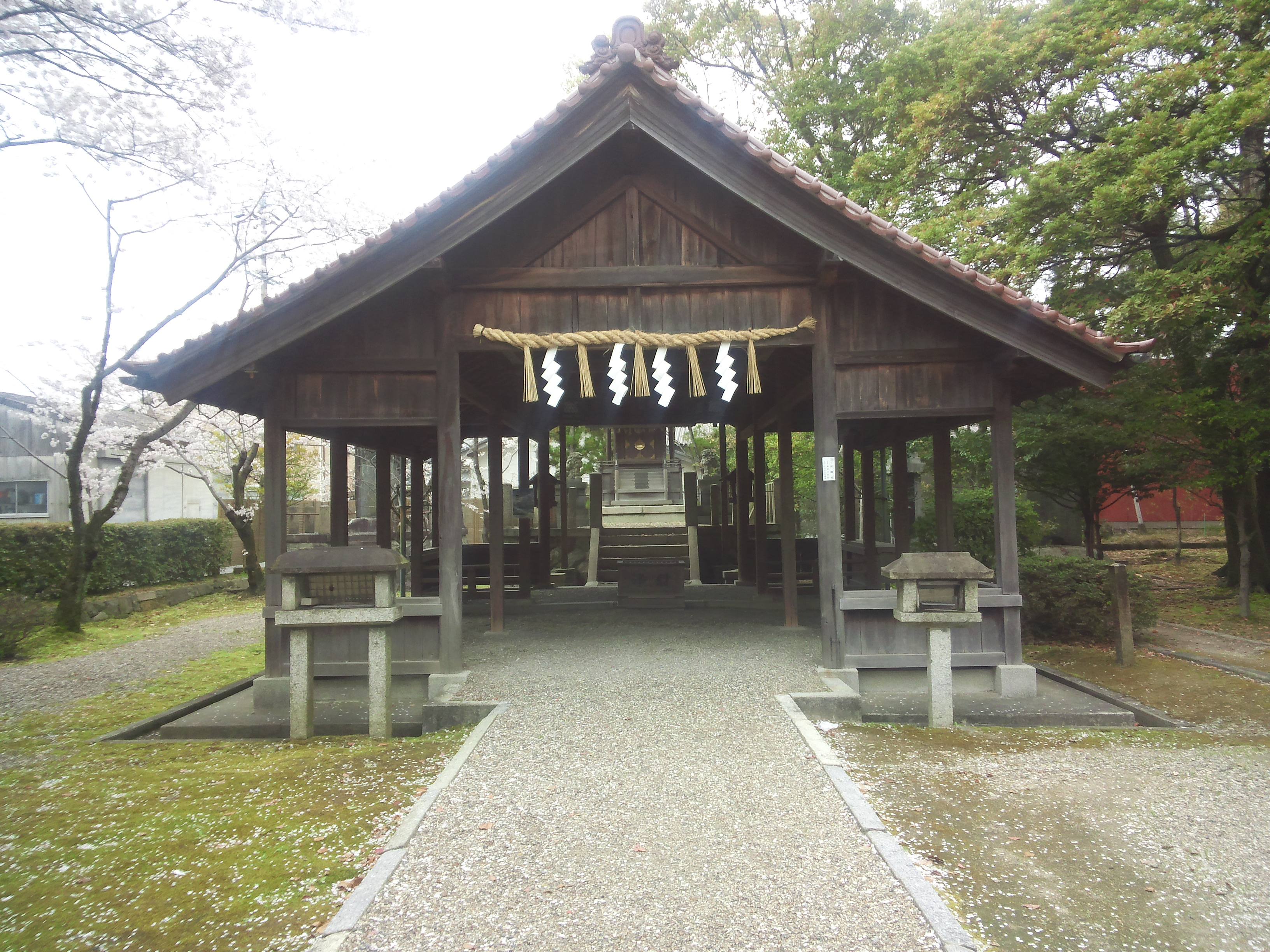 津島神社 - 津島照魂社